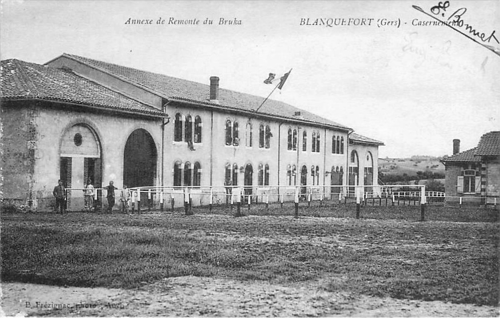 Casernement